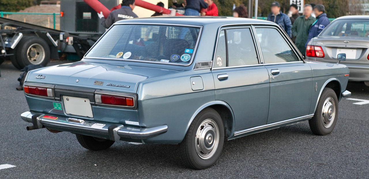 Datsun Bluebird 1400 Deluxe